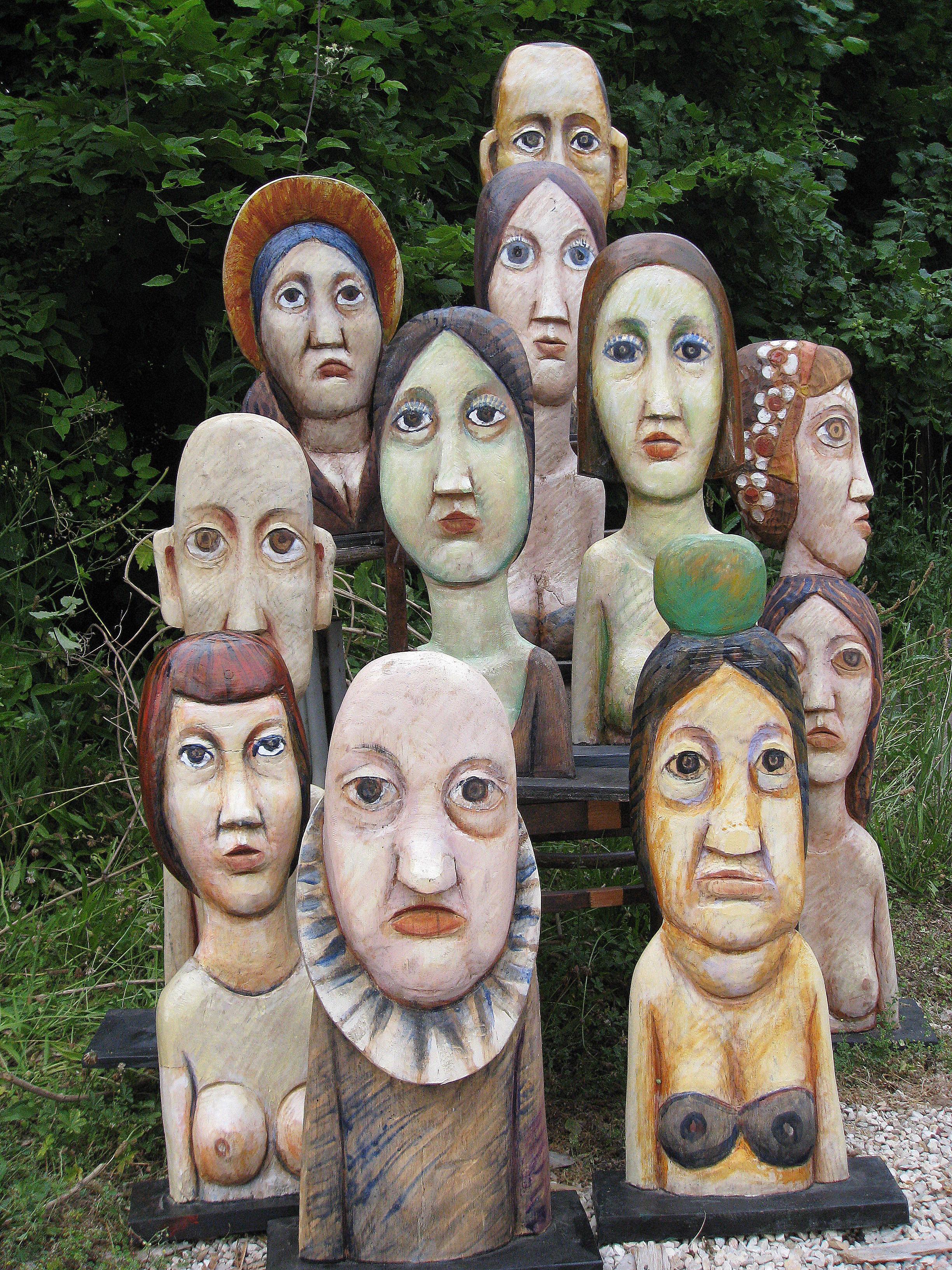 Photo de famille - bois 0,35 à 0,75 m - fin années 90